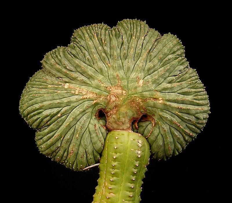 Euphorbia obesa fa. cristata